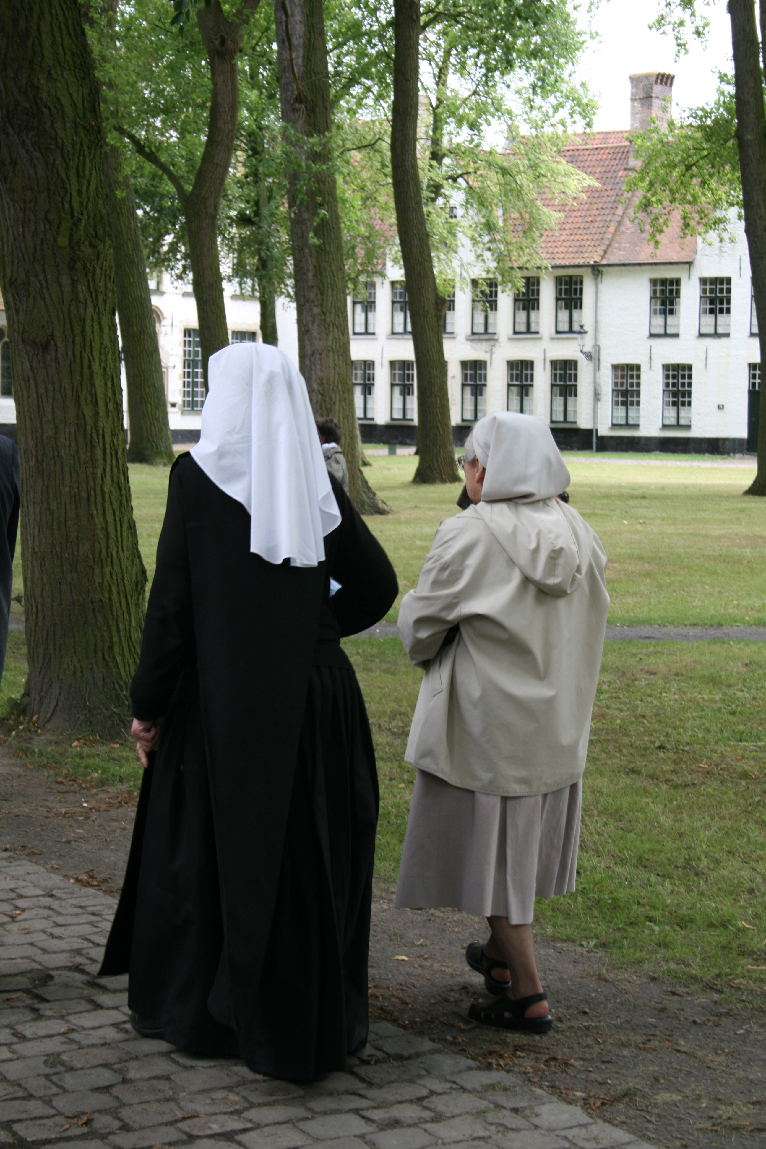 Bruges (Belgique), à l'intérieur du béguinage.